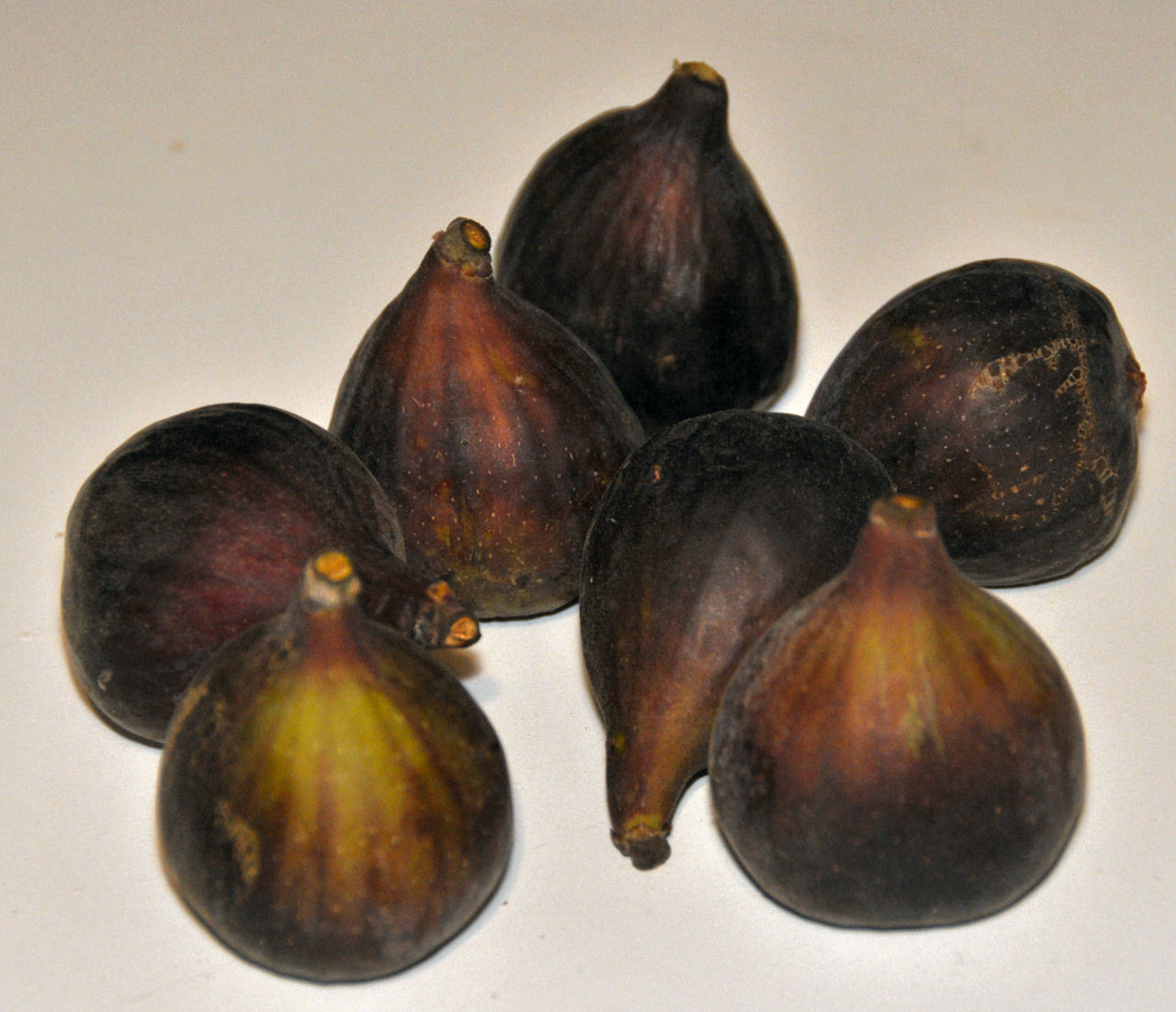 Montréal - Figue